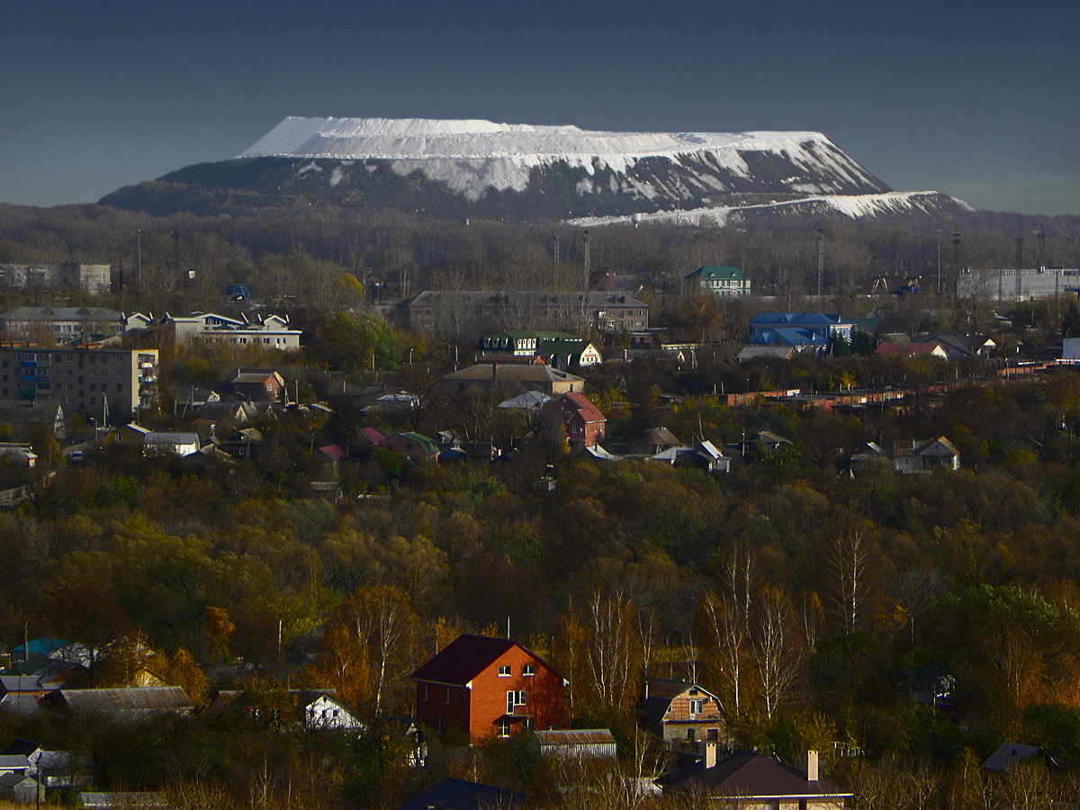 Воскресенск.Белая гора.